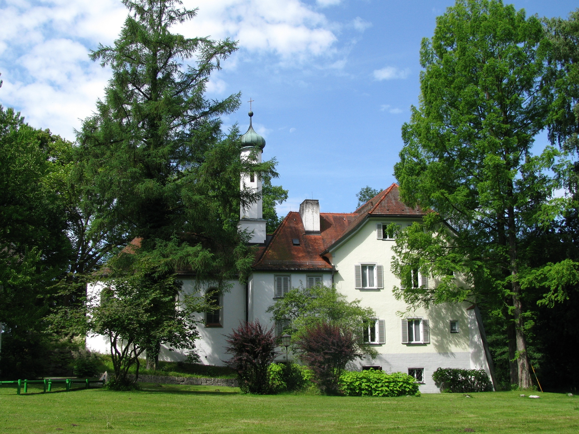 Schloss Hartmannsberg